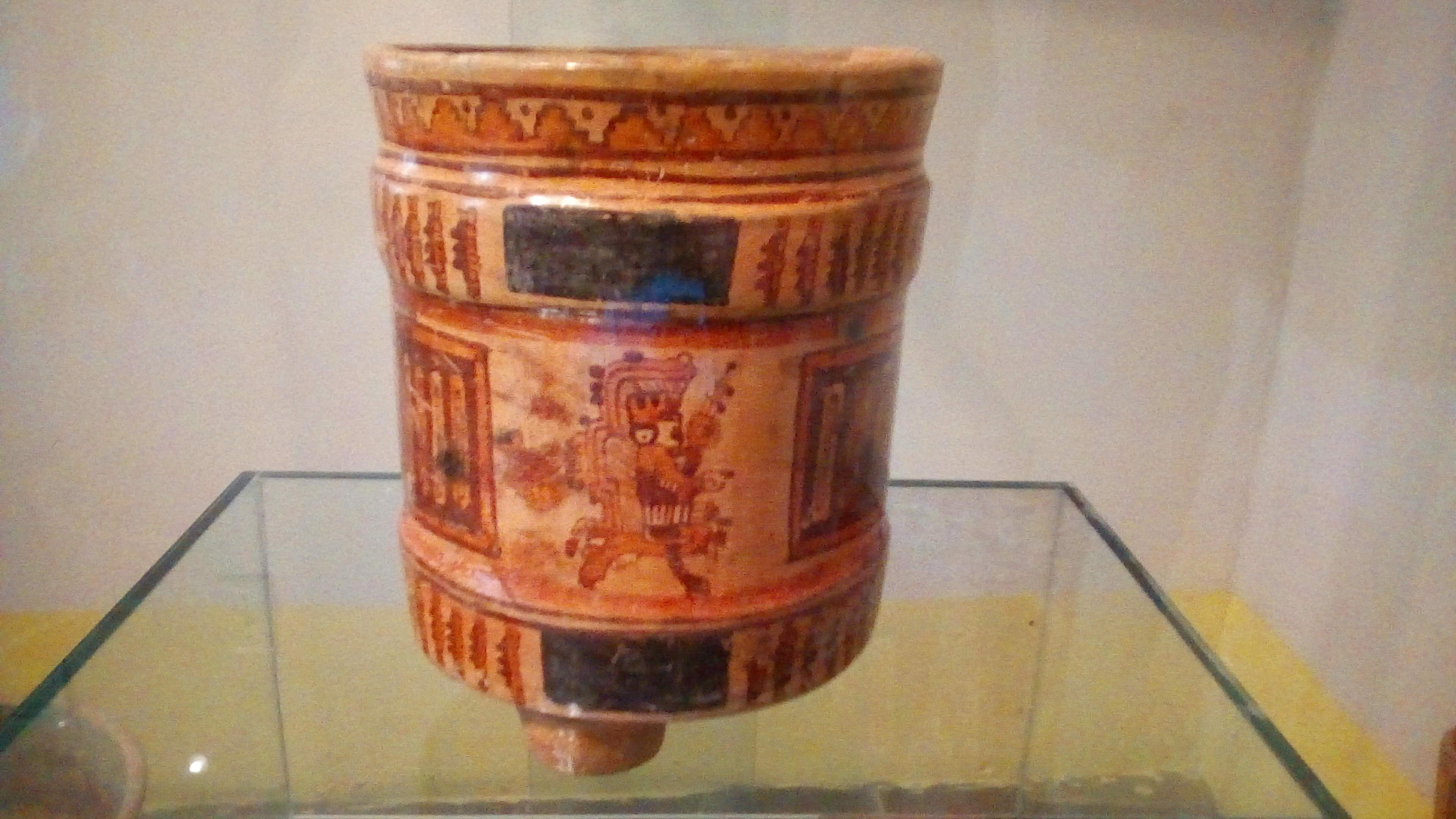 Vasija del clasico